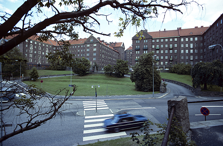 Bostadsområde. Motiv: Nedre Johanneberg Nyckelord: Riksintressen Kategori: StadsmiljöBostadsområde.